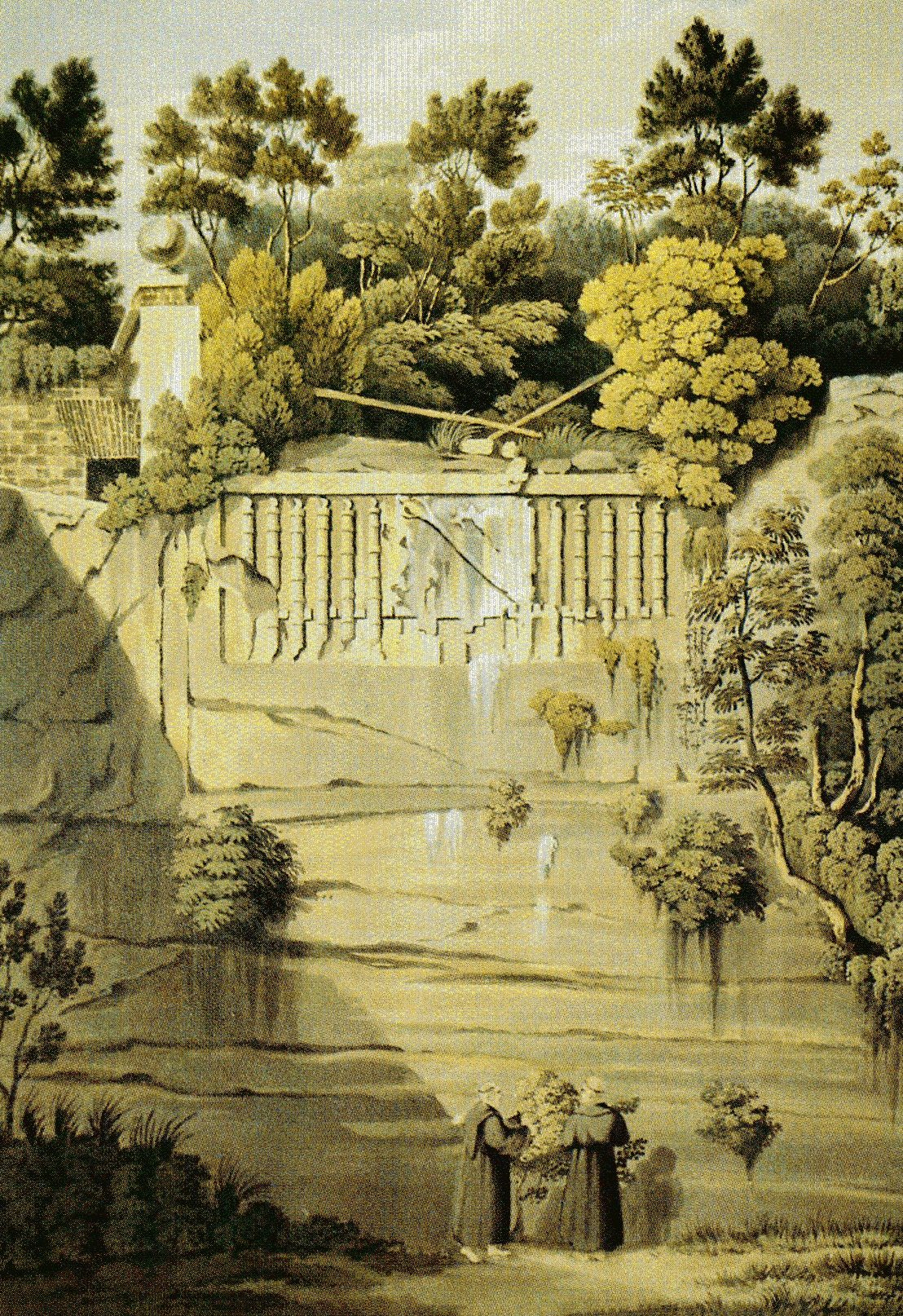 Il sepolcro di Palazzolo a Rocca di Papa (RM)